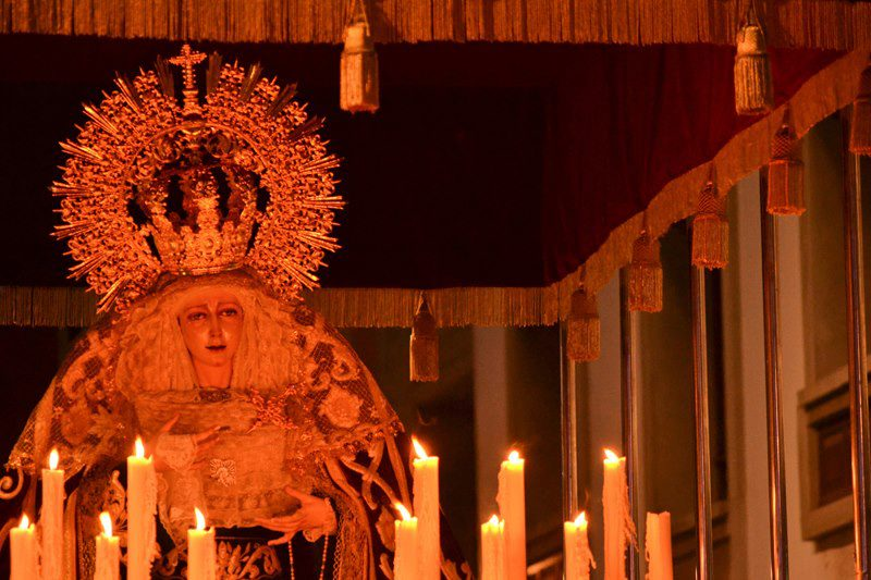 Real Hermandad y Cofradía de Nuestro Padre Jesús de la Sentencia y María Santísima de la Amargura